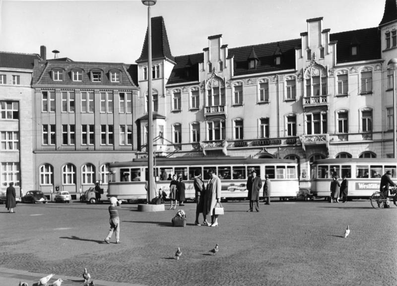 Bielefeld Stadtaufnahmen Hotel Bielefelder Hof